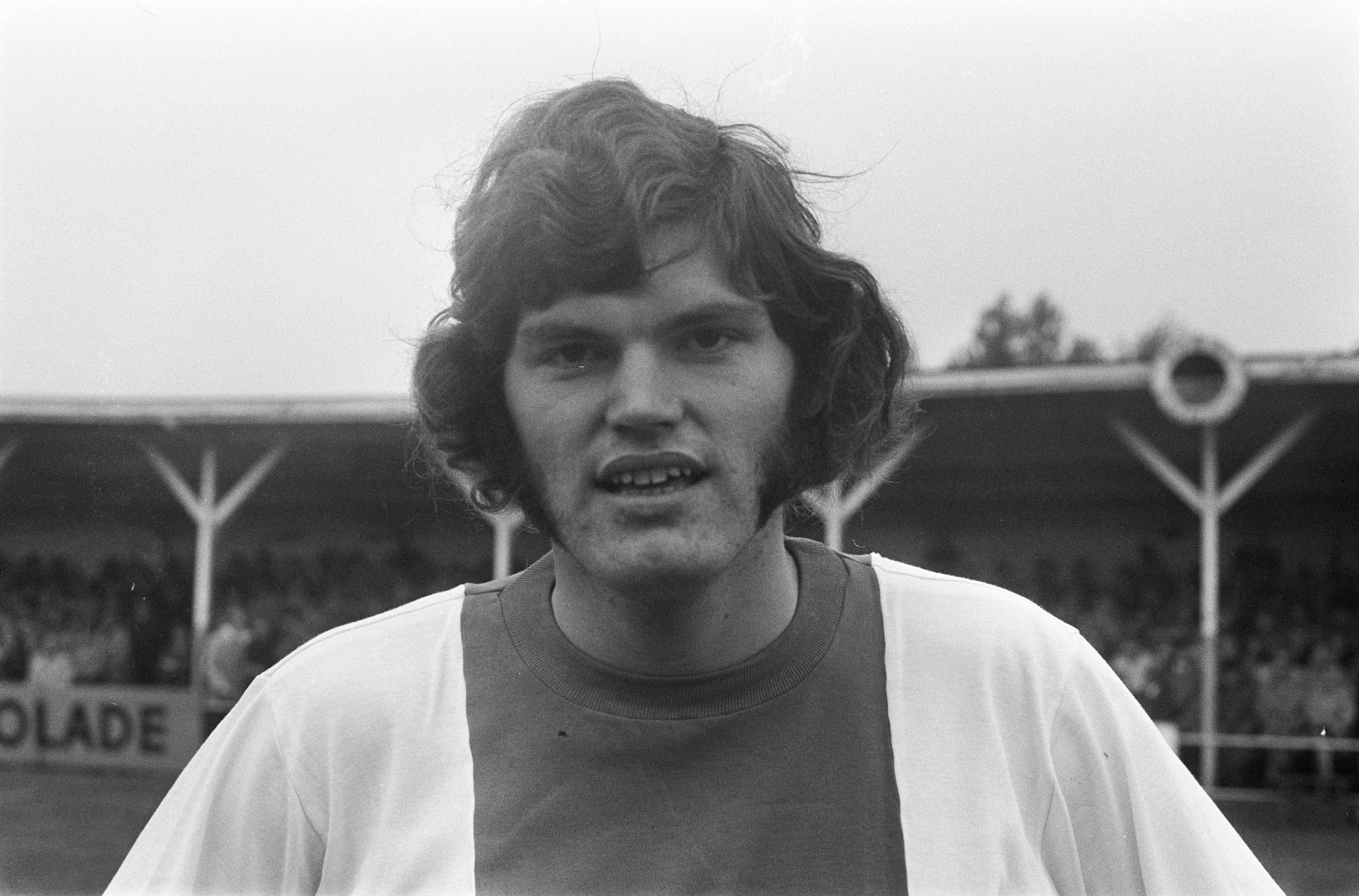 Collectie / Archief : Fotocollectie Anefo Reportage / Serie : [ onbekend ] Beschrijving : Excelsior tegen Ajax 1-1; nr. 4: Hulshoff, kop, nr. 5: Mühren, kop, nr. 6: Rijnders kop Datum : 4 oktober 1970 Trefwoorden : sport, voetbal Persoonsnaam : Hulshoff, Mühren, Gerrie, Rijnders Instellingsnaam : Excelsior Fotograaf : Koch, Eric / Anefo, [onbekend] Auteursrechthebbende : Nationaal Archief Materiaalsoort : Negatief (zwart/wit) Nummer archiefinventaris : bekijk toegang 2.24.01.05 Bestanddeelnummer : 923-8985